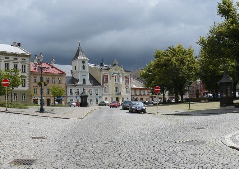 Králíky (Czechy) - rynek.